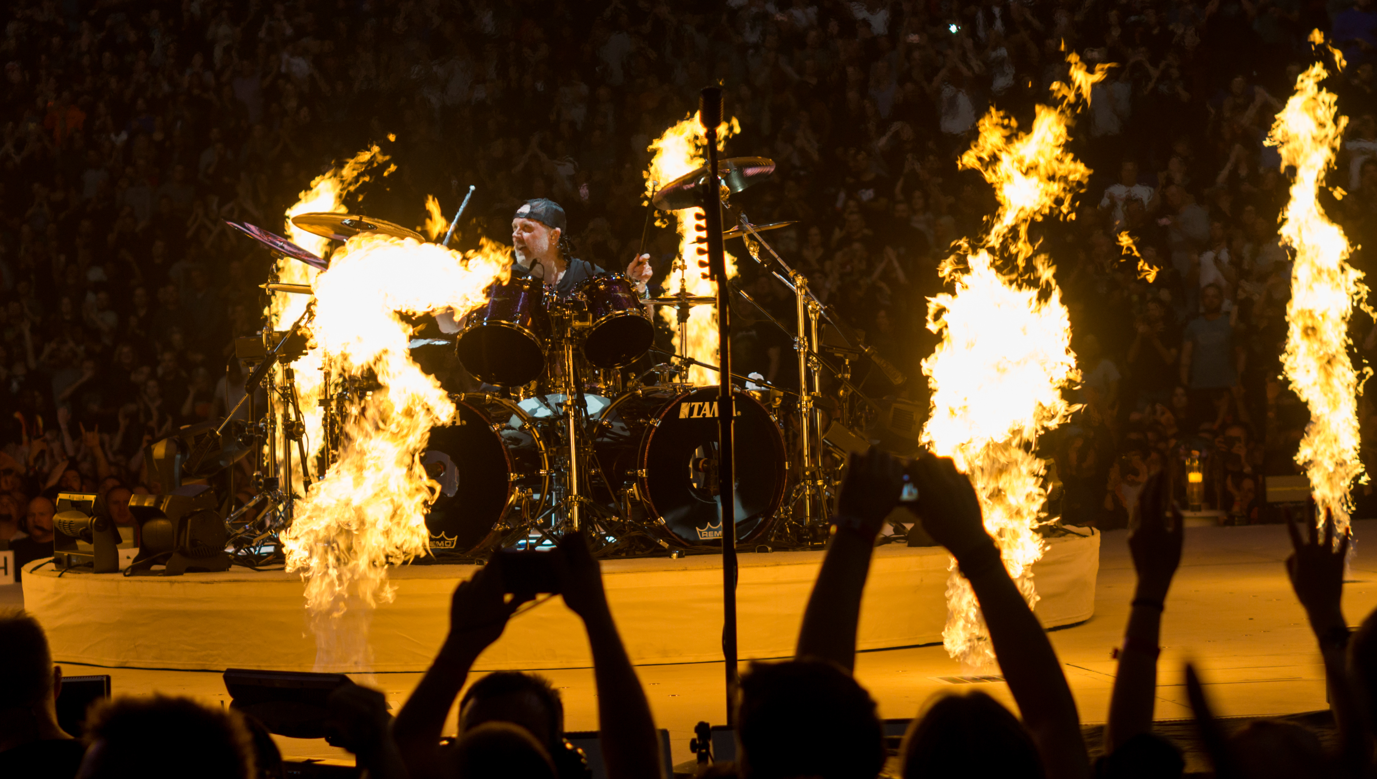 MetallicaO2221017-91